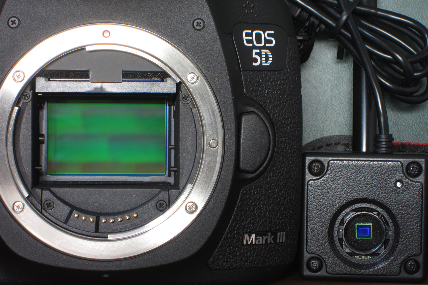 キヤノン EOS 5D Mark IIIとja:大人の科学特撮カメラのja:CMOSイメージセンサーサイズ比較。（キヤノン IXY 31Sによる撮影）